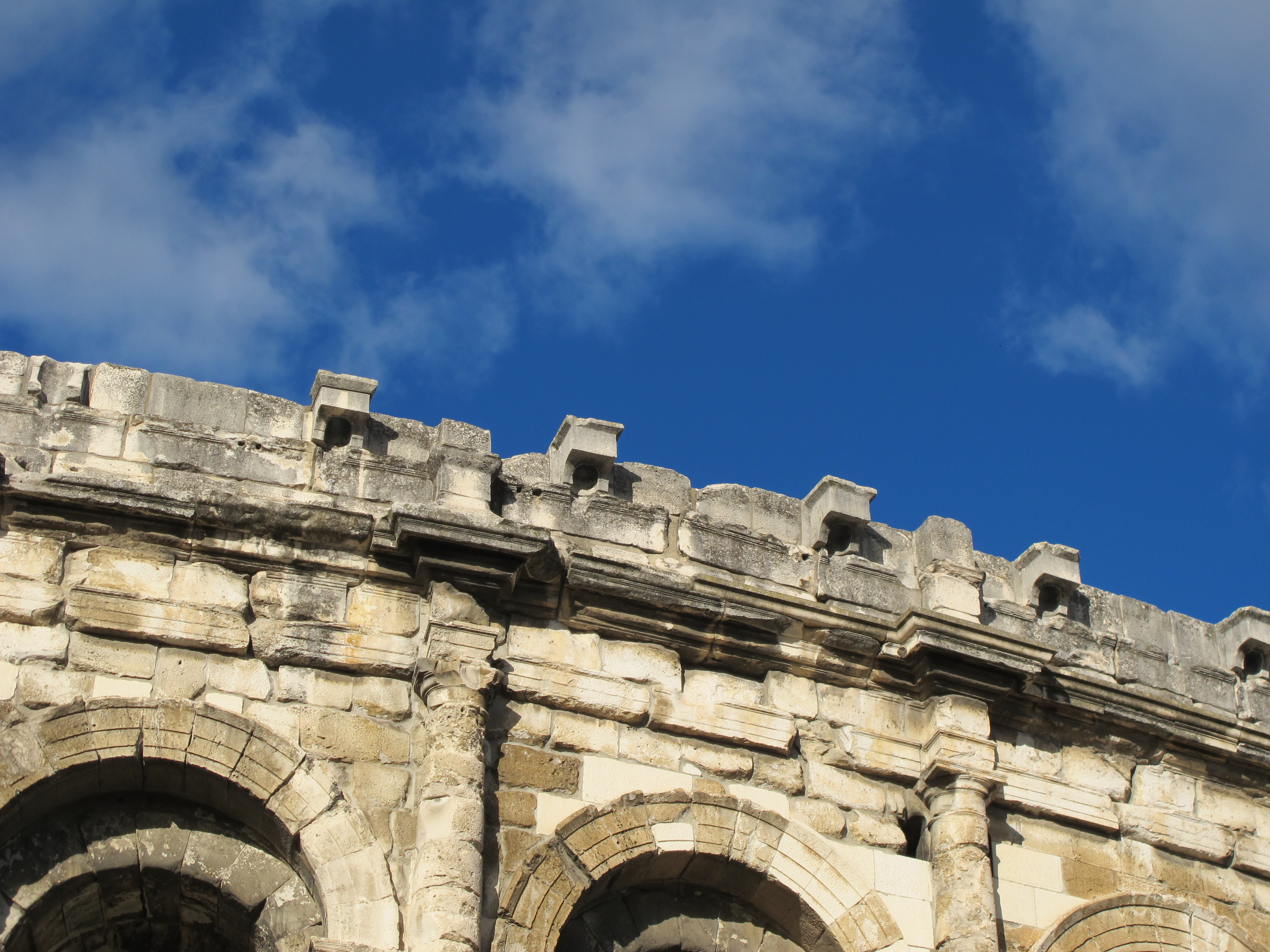 Arènes de Nîmes, vue des pierres formant les bases de mât pour tendre le vellum, au sommet de trois arcades. A gauche la pierre est cassée, montrant le canon cylindrique.